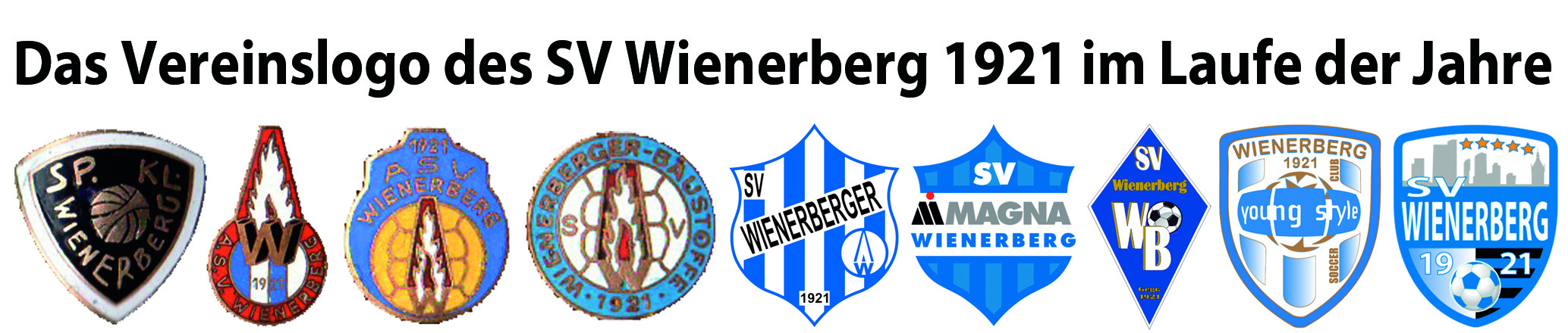 Vereinswappen